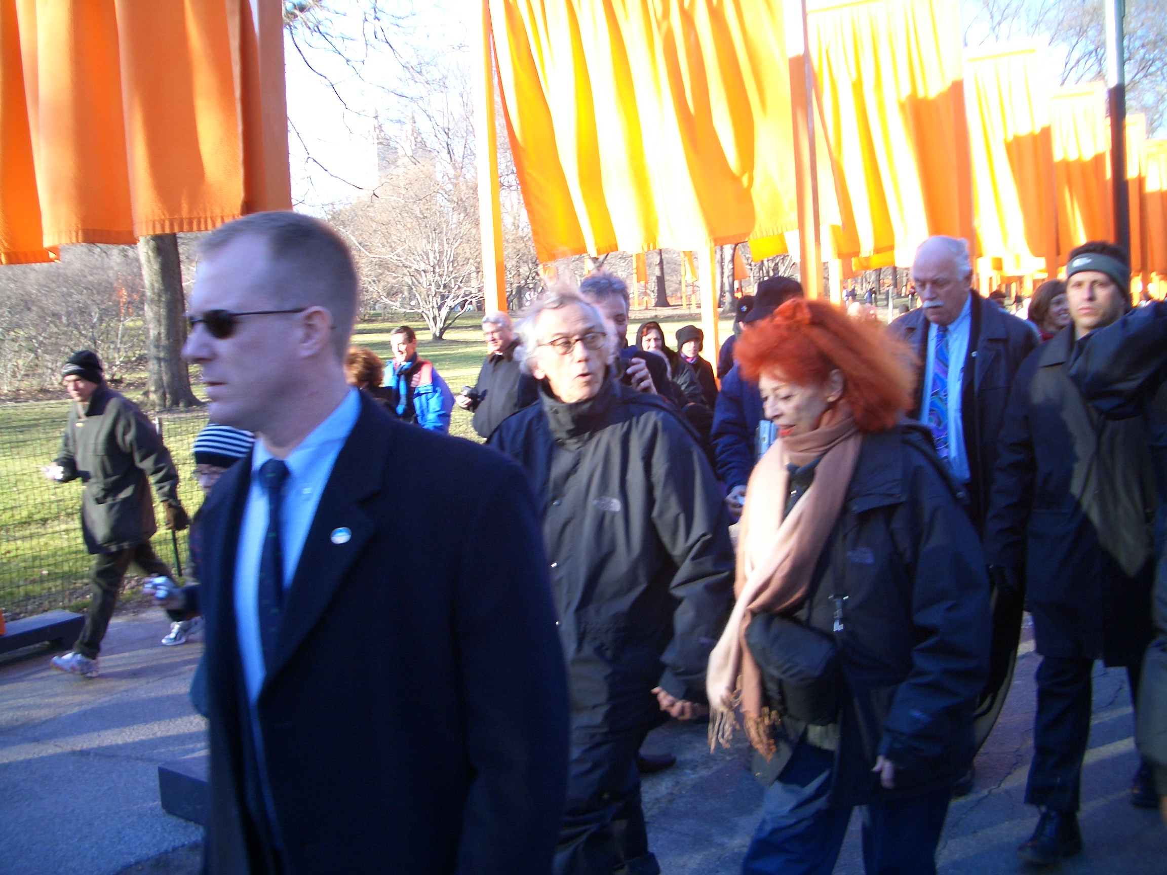 Christo und Jeanne-Claude beim Spaziergang in The Gates, New York